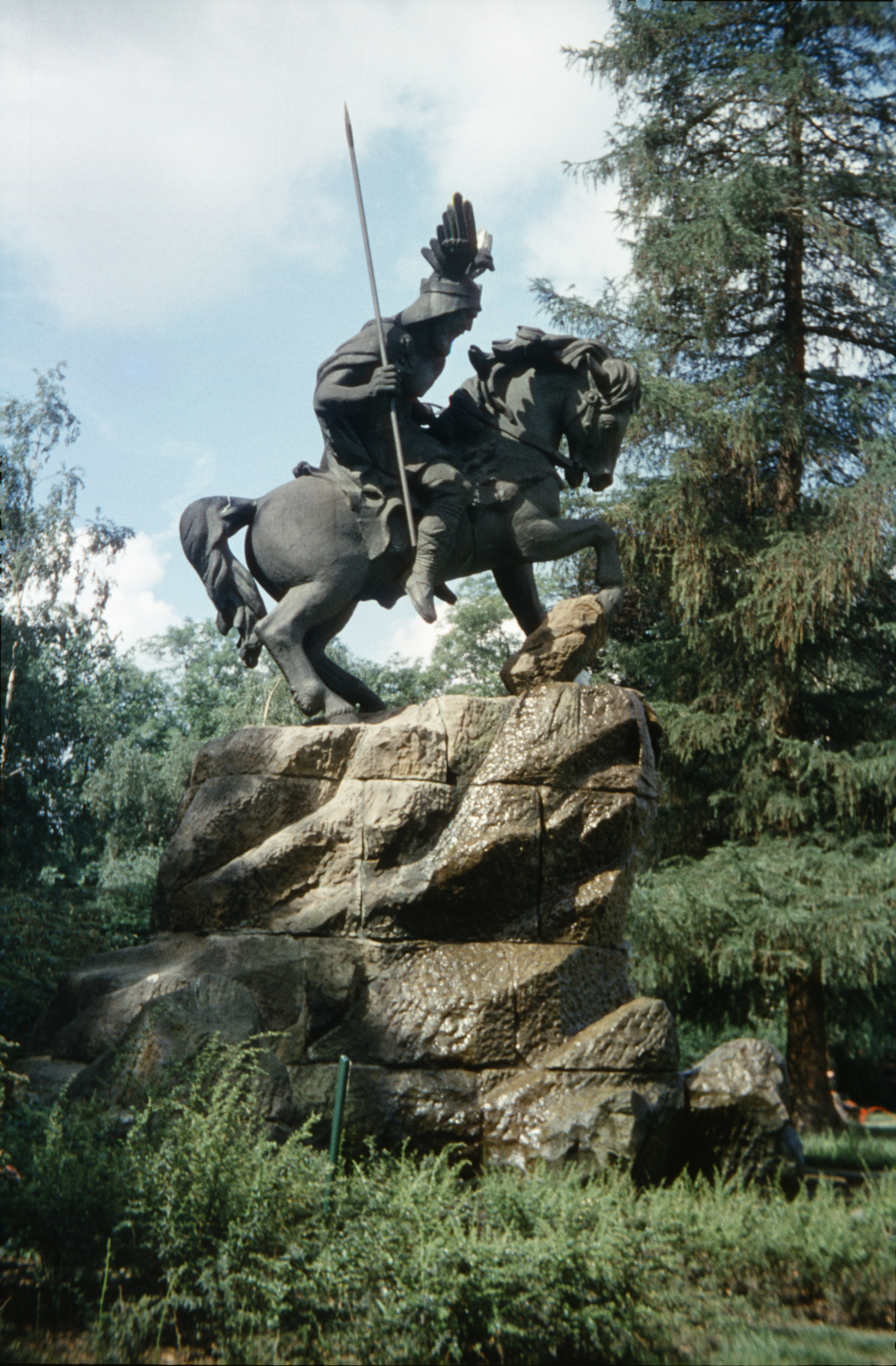 Widukind-Denkmal in Herford, Nordrhein-Wesfalen; Reiterstandbild von 1959 als Replikat eines 1899 eingeweihten, 1942 für Rüstungszwecke eingeschmolzenen Originals auf dem ursprünglichen Sockel